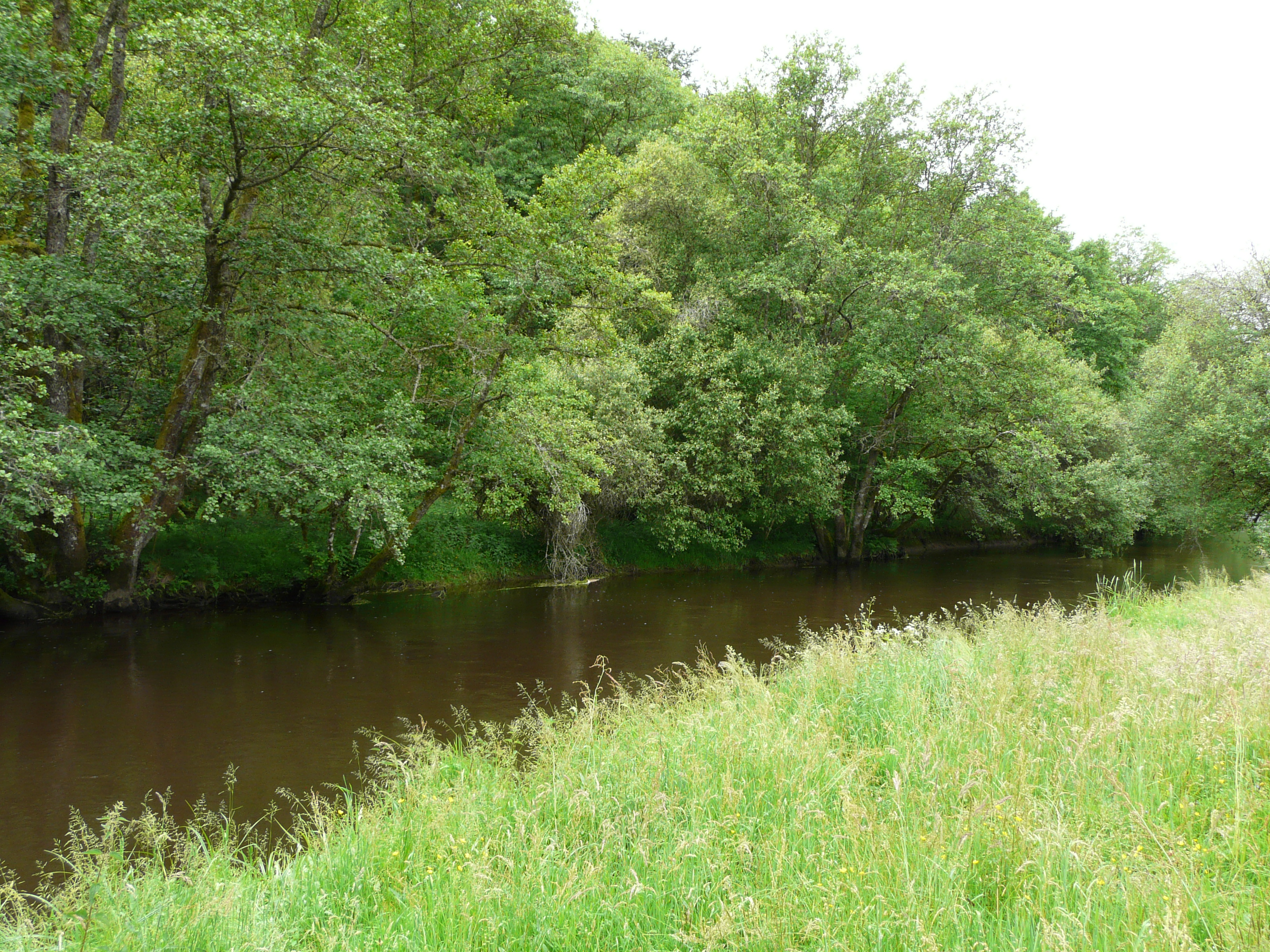 En contrebas de l'aire de la Loutre, la Diège marque la limite entre les communes de Saint-Exupéry-les-Roches (au premier plan) et Mestes (en rive opposée), Corrèze, France.